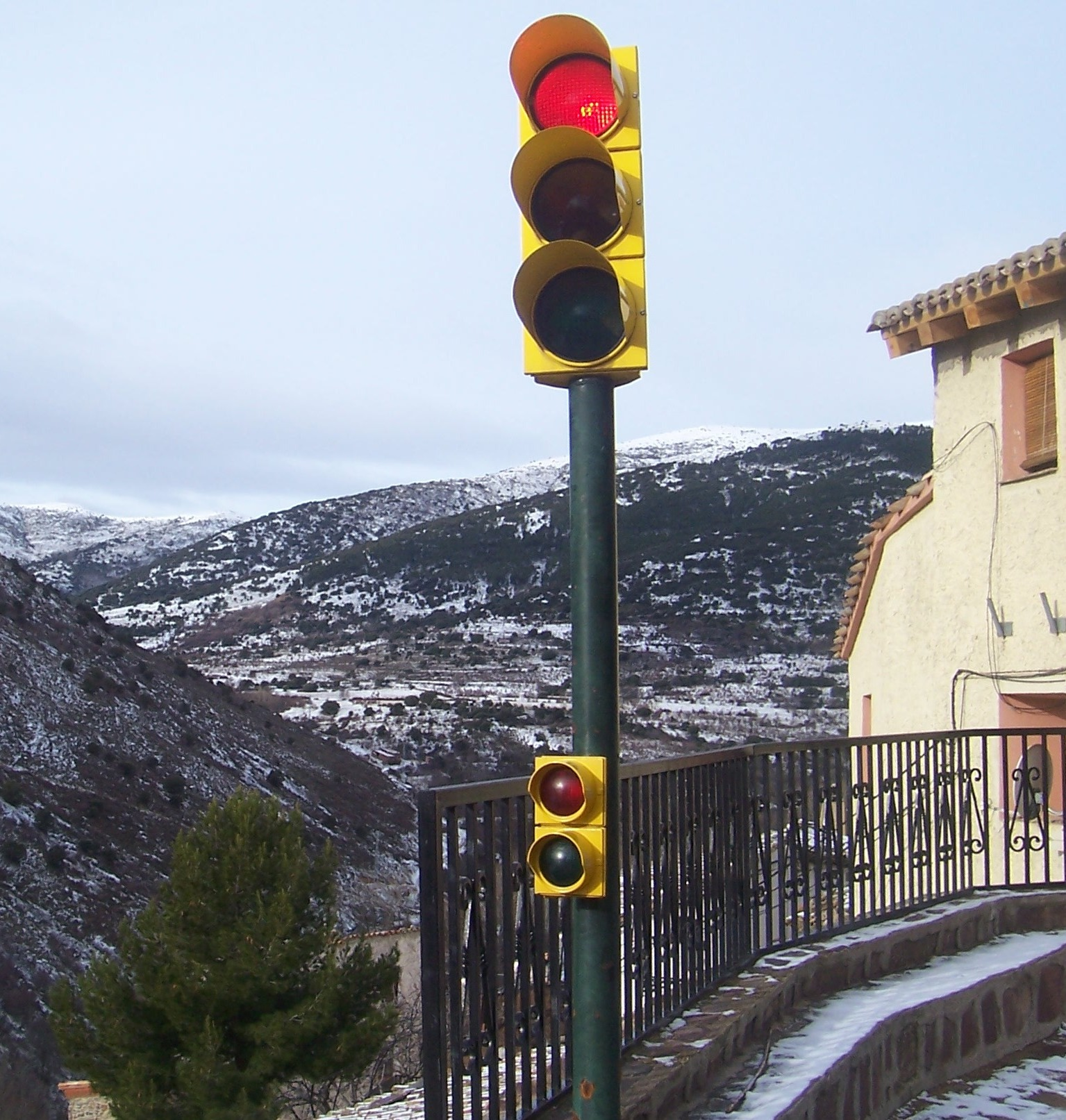 Semáforo de la plaza del ayuntamiento de Purujosa.